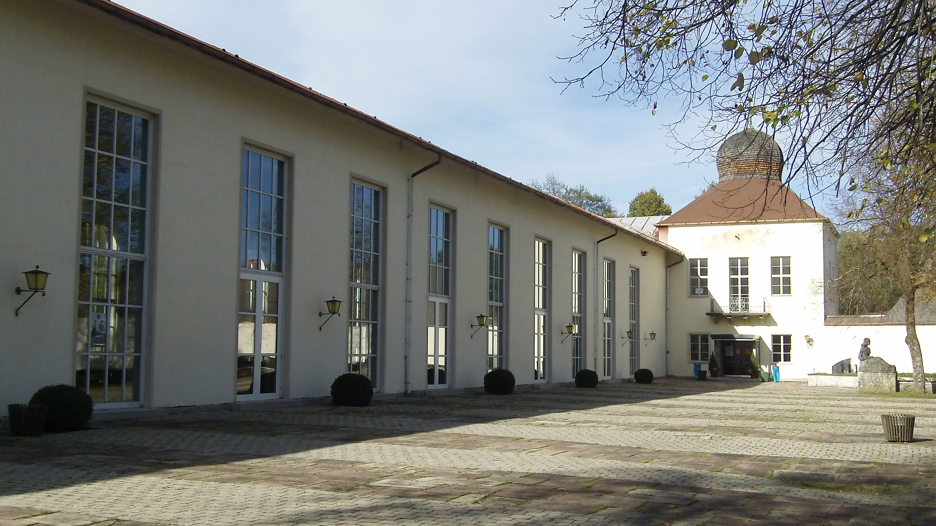 Wandelhalle mit Turmanbau und Freitreppenanlage mit lagernder FrauenskulpturThis is a photograph of an architectural monument.